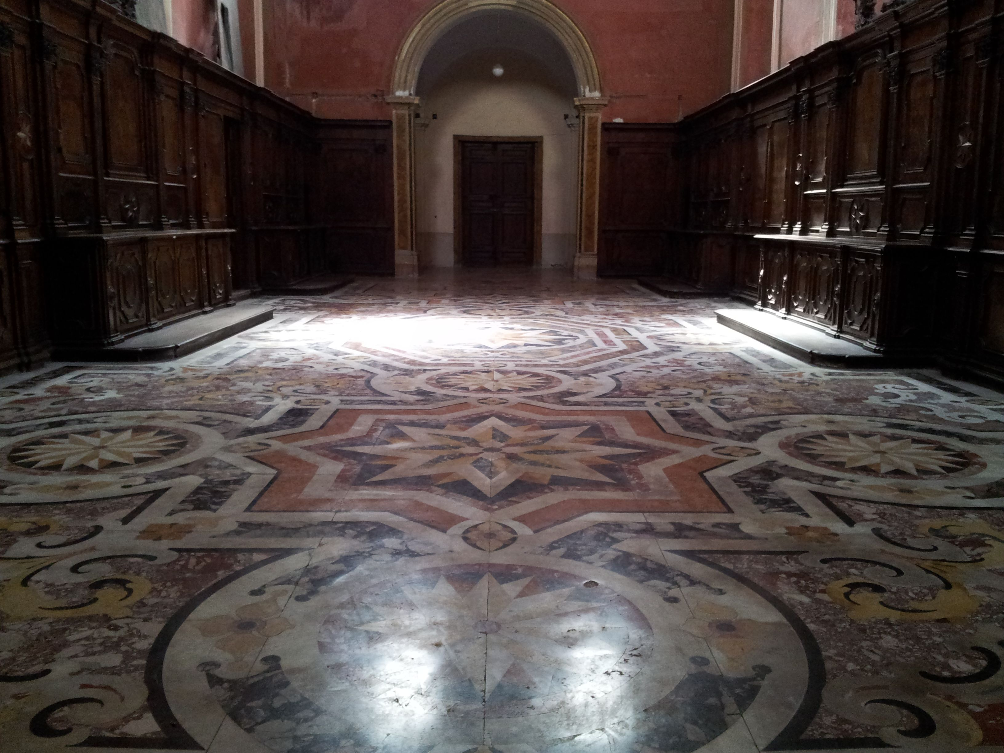 Chiesa dei Girolamini (Napoli) - Il pavimento della sacrestia